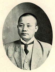 Bân-lâm-gú: 葉清耀 Ia̍p Chheng-iāu